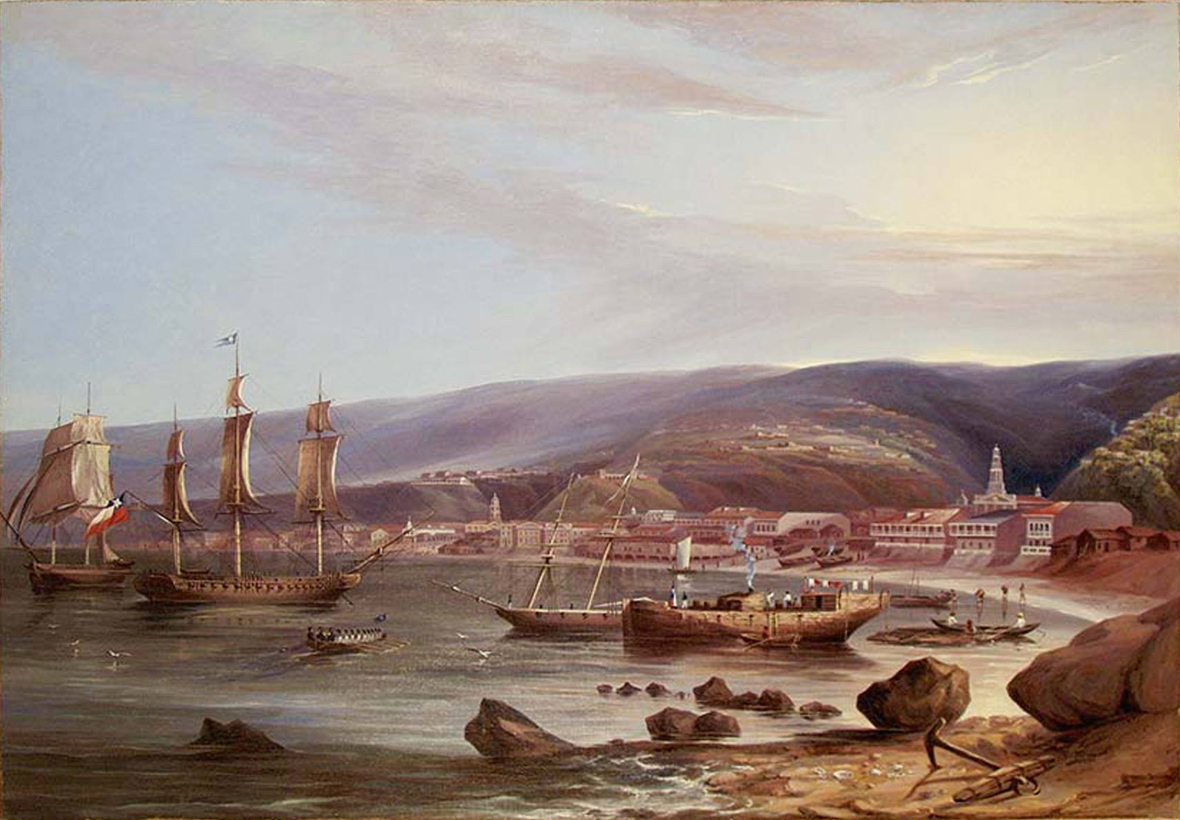 Santiagonostalgico escribió: Jacob Ward, viajó a Chile en 1845 con su hermano Charles V. Ward. Los dos trabajaron en Valparaíso y Santiago , Chile , dibujar y tomar daguerrotipos . Durante este tiempo, también viajaron a Perú , Bolivia y Panamá . Ellos regresaron a los Estados Unidos en 1847 o 1848. es Valparaiso, la primera fragata de nombre "Chile" pintada c. 1845 por el pintor y daguerrotista norteamericano Jacob C. Ward(1809-1891) .La nave al mando del Capitán de navío Robert Simpson.